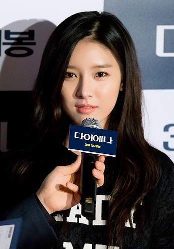 140219-다이애나-VIP시사회김소은